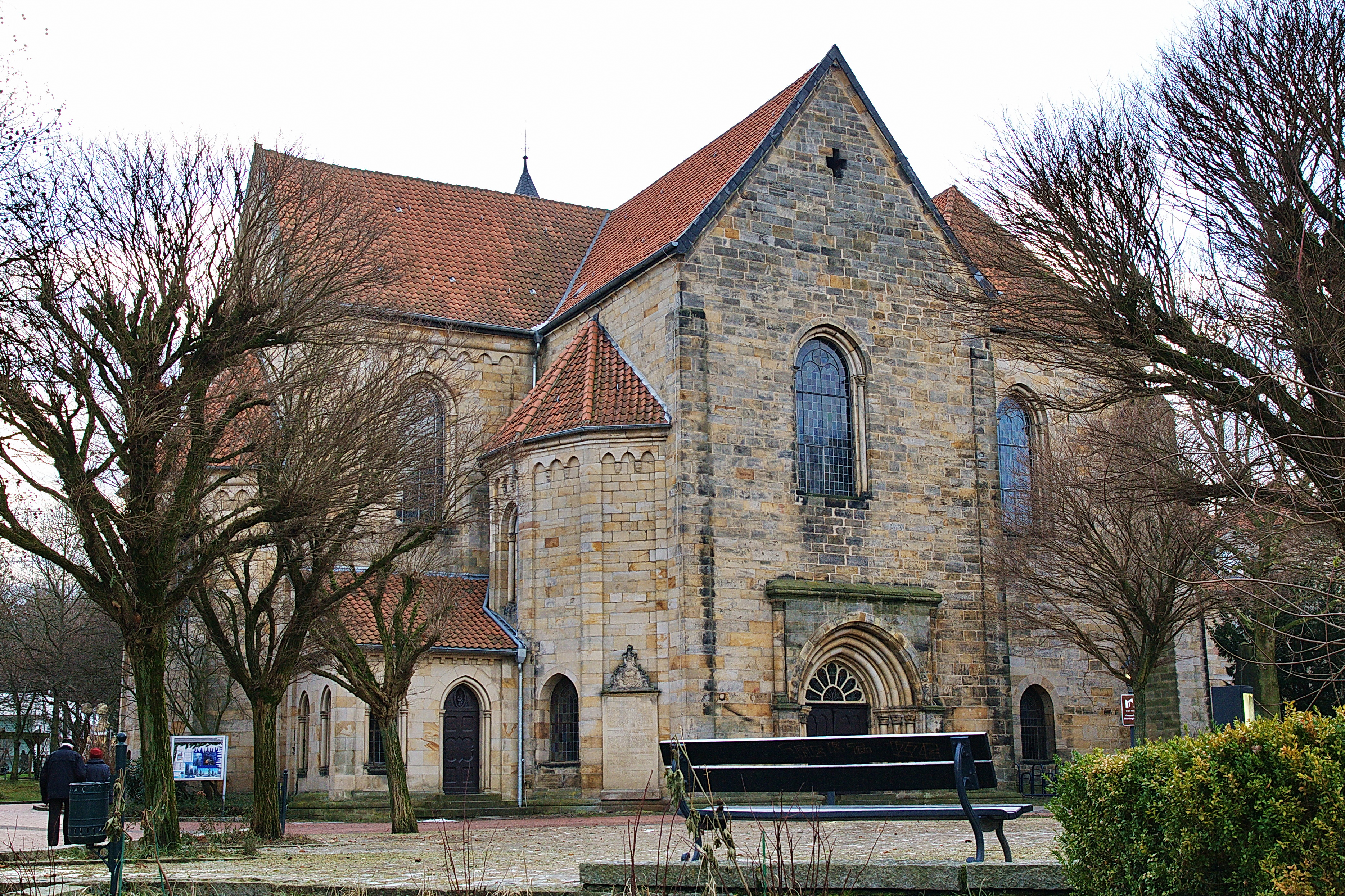 Klosterkirche St.Marien Barsinghausen, Niedersachsen, Deutschland